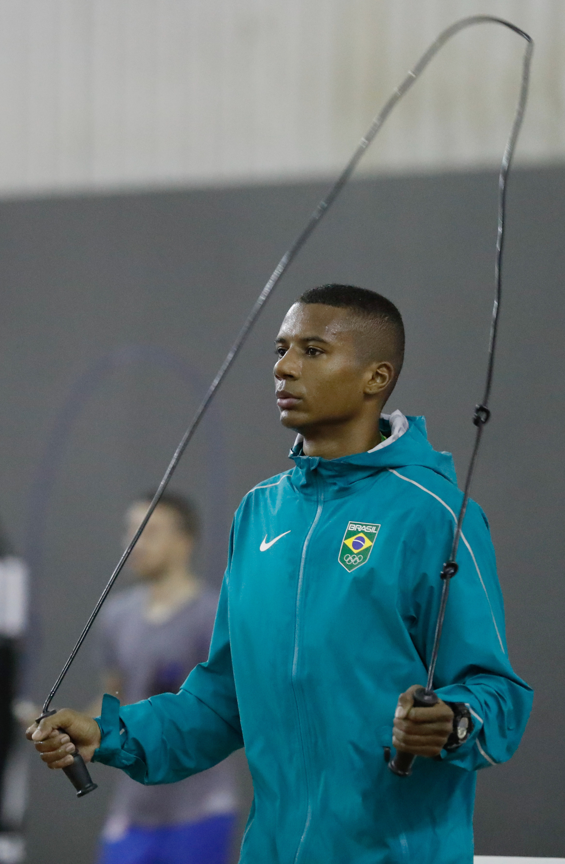 Rio de Janeiro - Patrick Lourenço, atleta da seleção brasileira de boxe, durante treino para os Jogos Olímpicos Rio 2016 na base do Time Brasil, na Urca (Fernando Frazão/Agência Brasil)